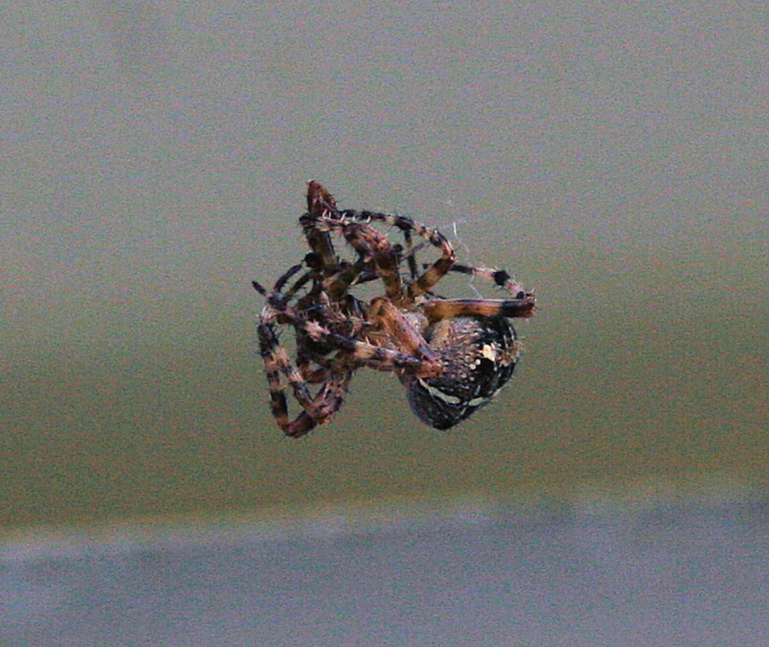 Kreuzspinne beim Paaren